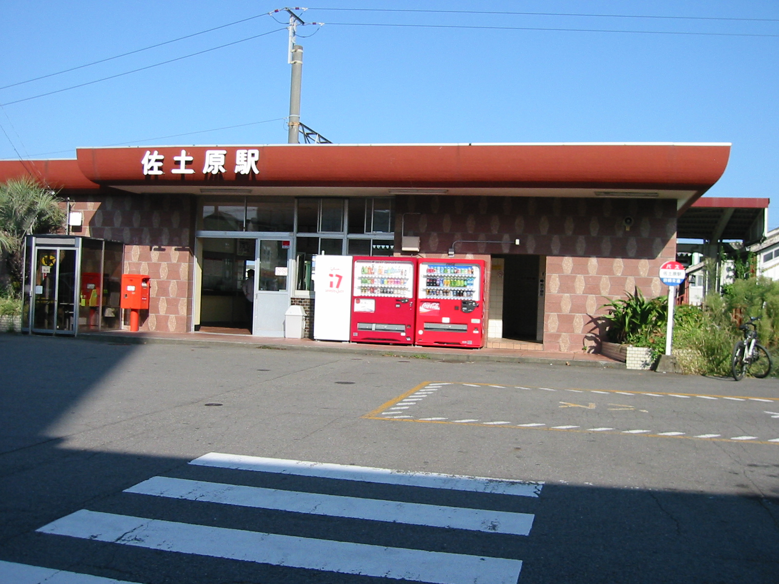 GFDL佐土原駅 2009年9月22日 利用者本人撮影